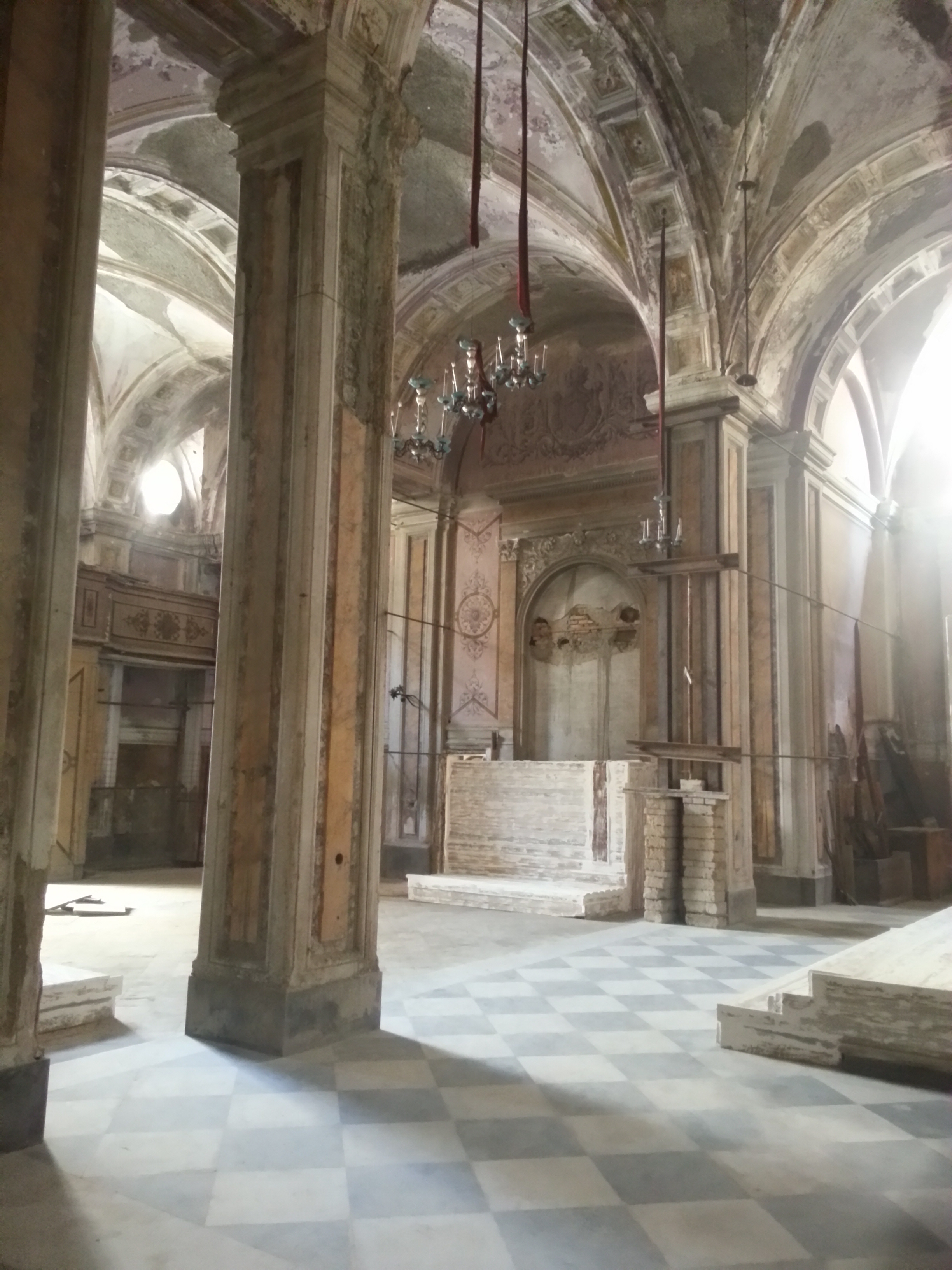 Interno dal transetto destro